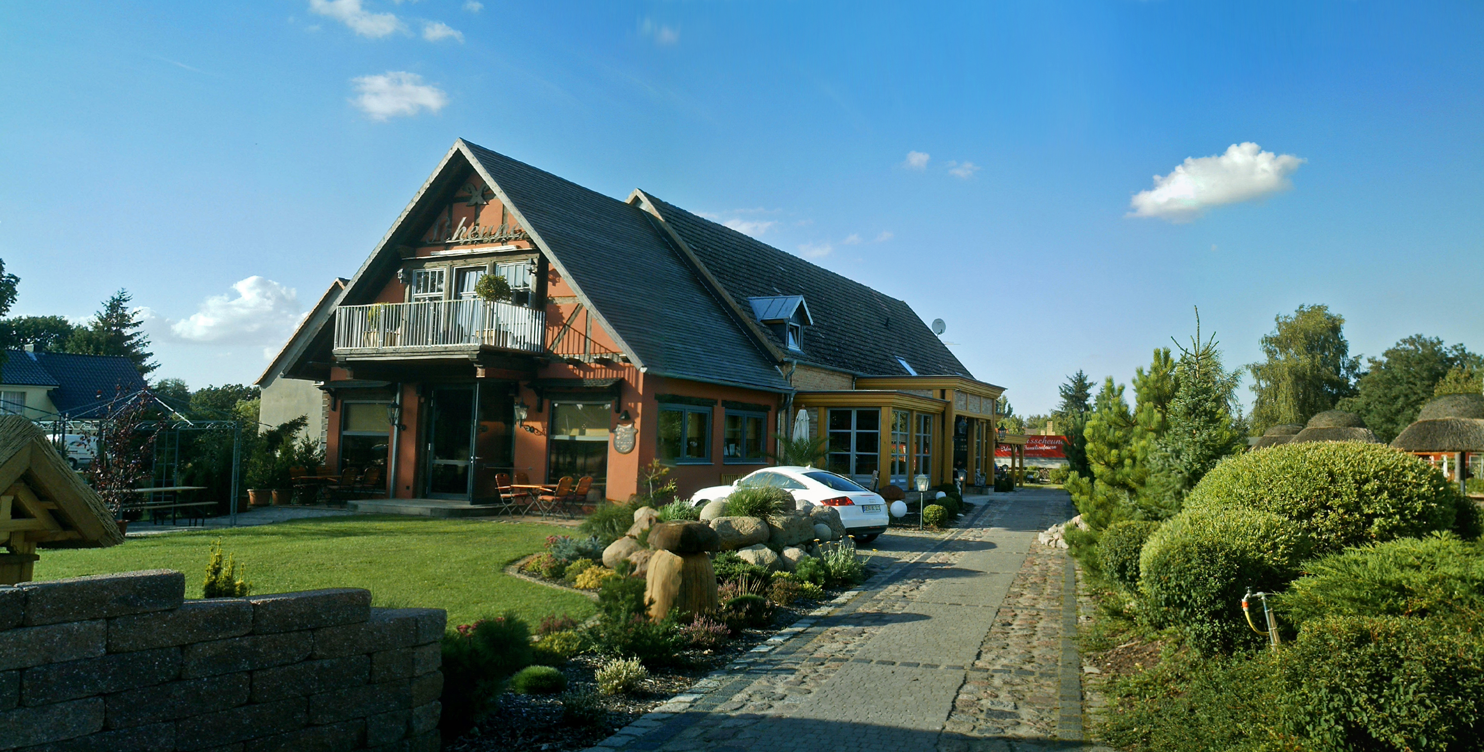 restaurierte Scheune in Mönkebude